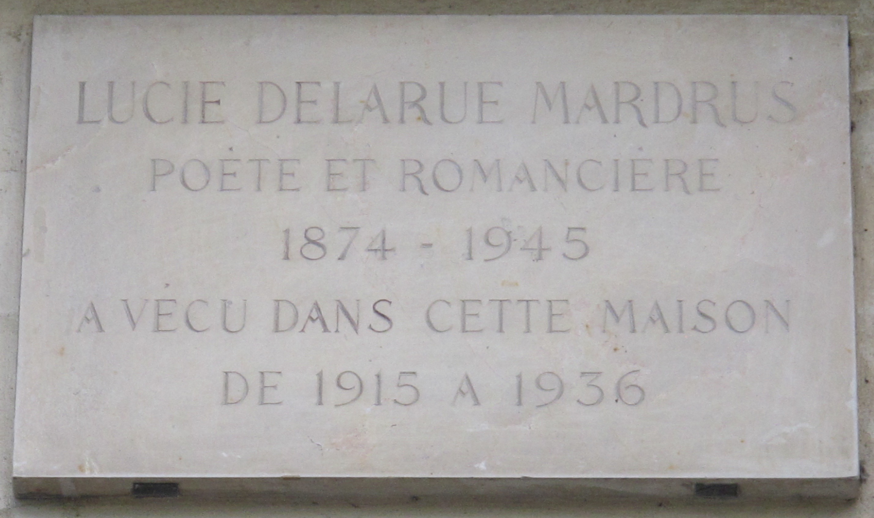 Plaque en hommage à la femme de lettres Lucie Delarue-Mardrus, n°17 bis quai Voltaire (Paris, 7e).